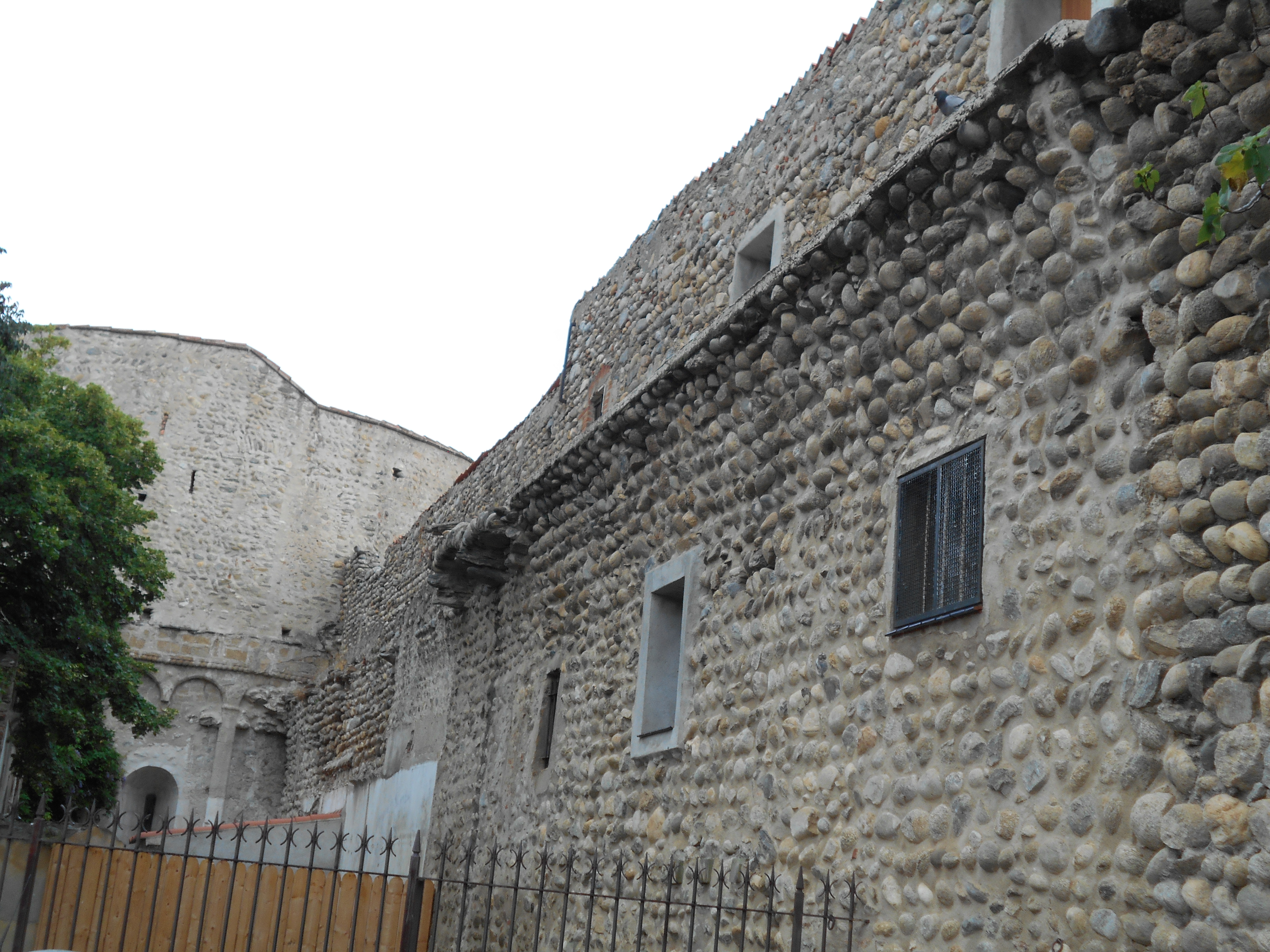 Muralles de la Vila fortificada d'Illa